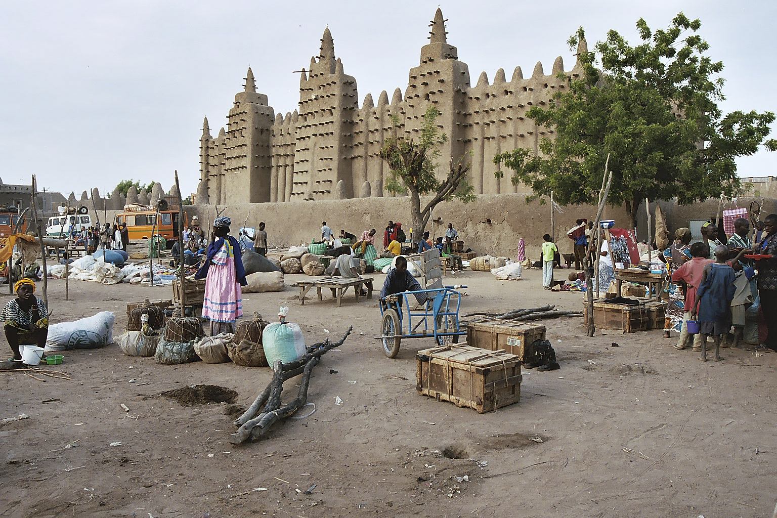 Djenné street market and the Great Mosque of Djenné — Mali.